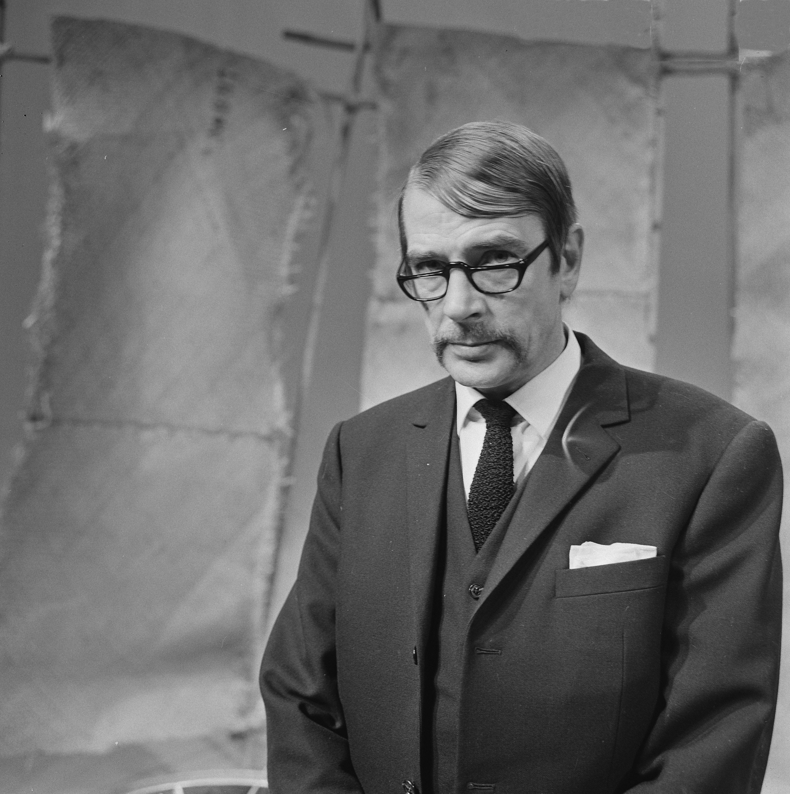 Collectie / Archief : Fotocollectie Anefo Reportage / Serie : [ onbekend ] Beschrijving : TV-programma van VARA "Hadimassa". Ton Lensink Datum : 3 februari 1970 Trefwoorden : TV-programma's Persoonsnaam : Lensink, Ton Fotograaf : Verhoeff, Bert / Anefo Auteursrechthebbende : Nationaal Archief Materiaalsoort : Negatief (zwart/wit) Nummer archiefinventaris : bekijk toegang 2.24.01.03 Bestanddeelnummer : 923-2143